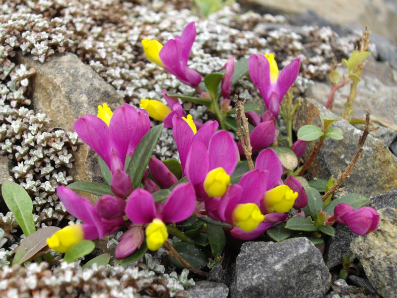 Polygala chamaebuxus 'Grandiflora' (Loidl)